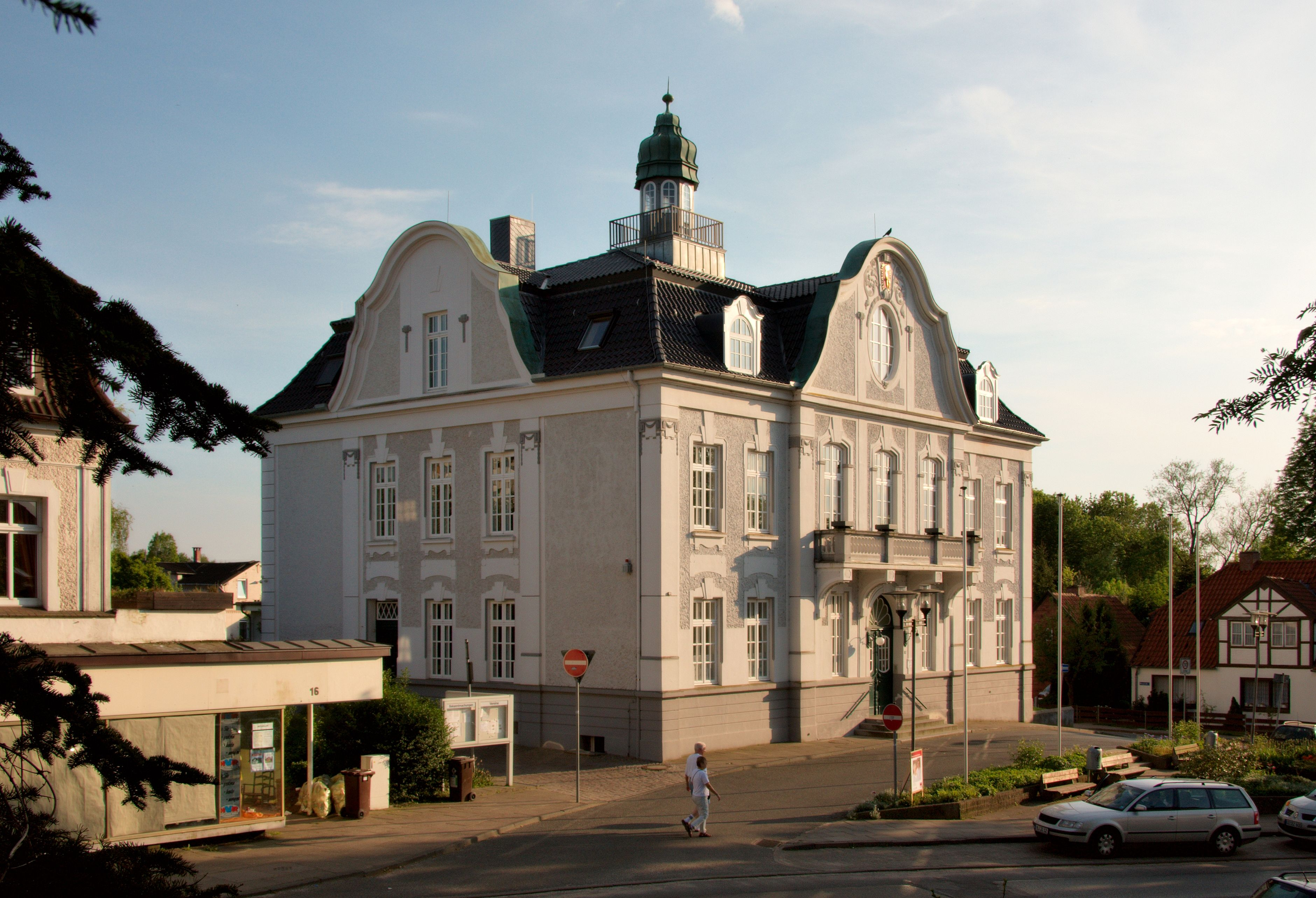 Rathaus in Reinfeld (Holstein), Germany